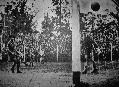 Ricardo Infante, jugador de Estudiantes de La Plata, convirtiendo un recordado gol "de rabona" a Rosario Central, por el torneo de Primera División de 1948.